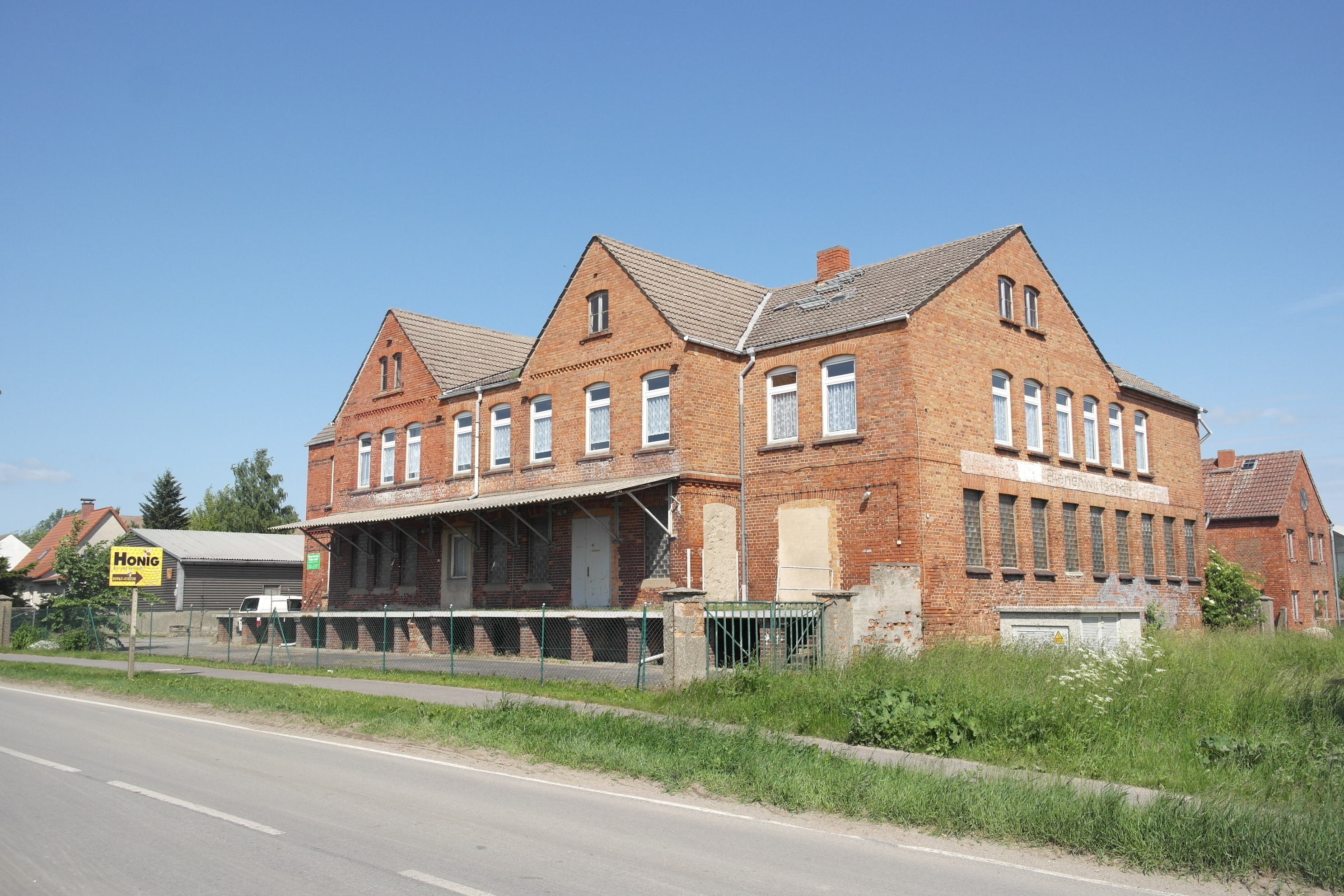 Oertzenhof, frühere Molkerei, denkmalgeschützt